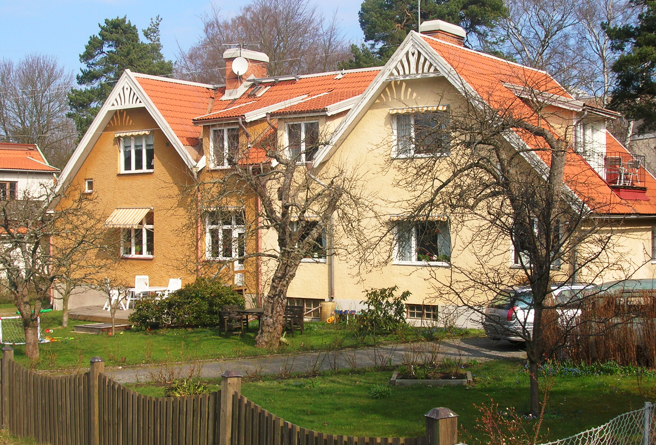 Buildings on Lindevägen 15, Enskede Gård. Built 1907